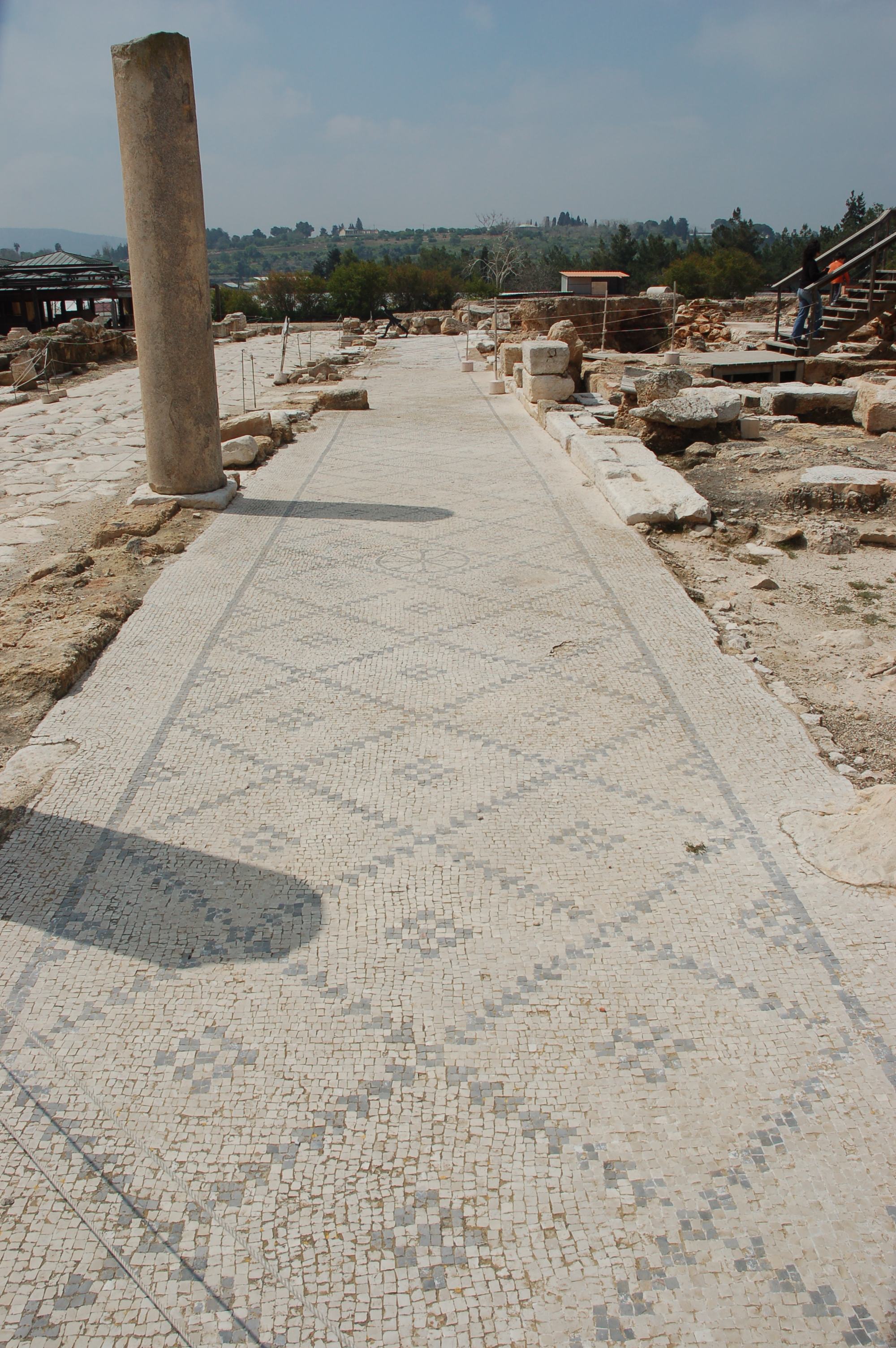 Tzippori Tzippori